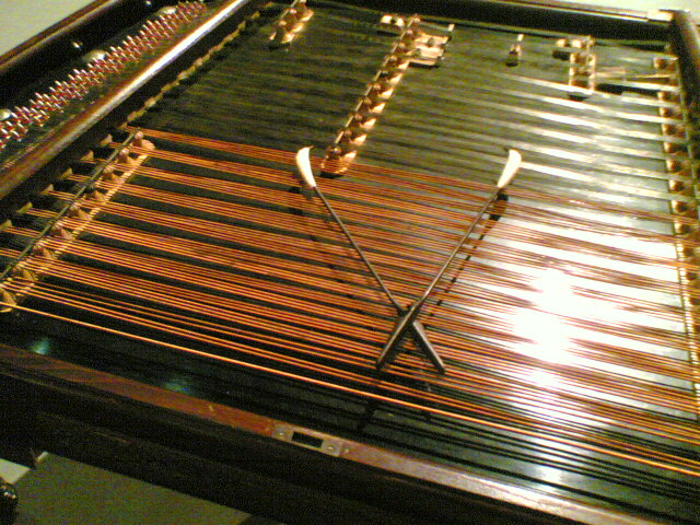 Hungarian Cimbalom Bohak Inside